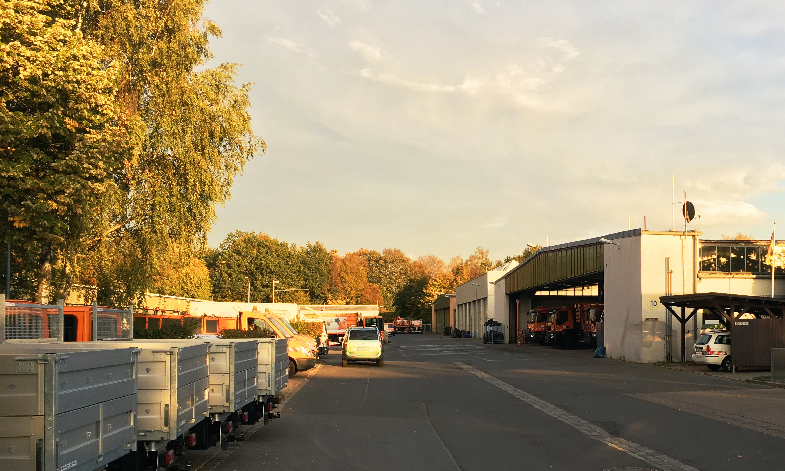 SÖR-Betriebshof auf dem Areal des ehemaligen